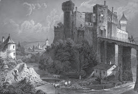 Burg Vajad Hunyad (Rumänien-Siebenbürgen)